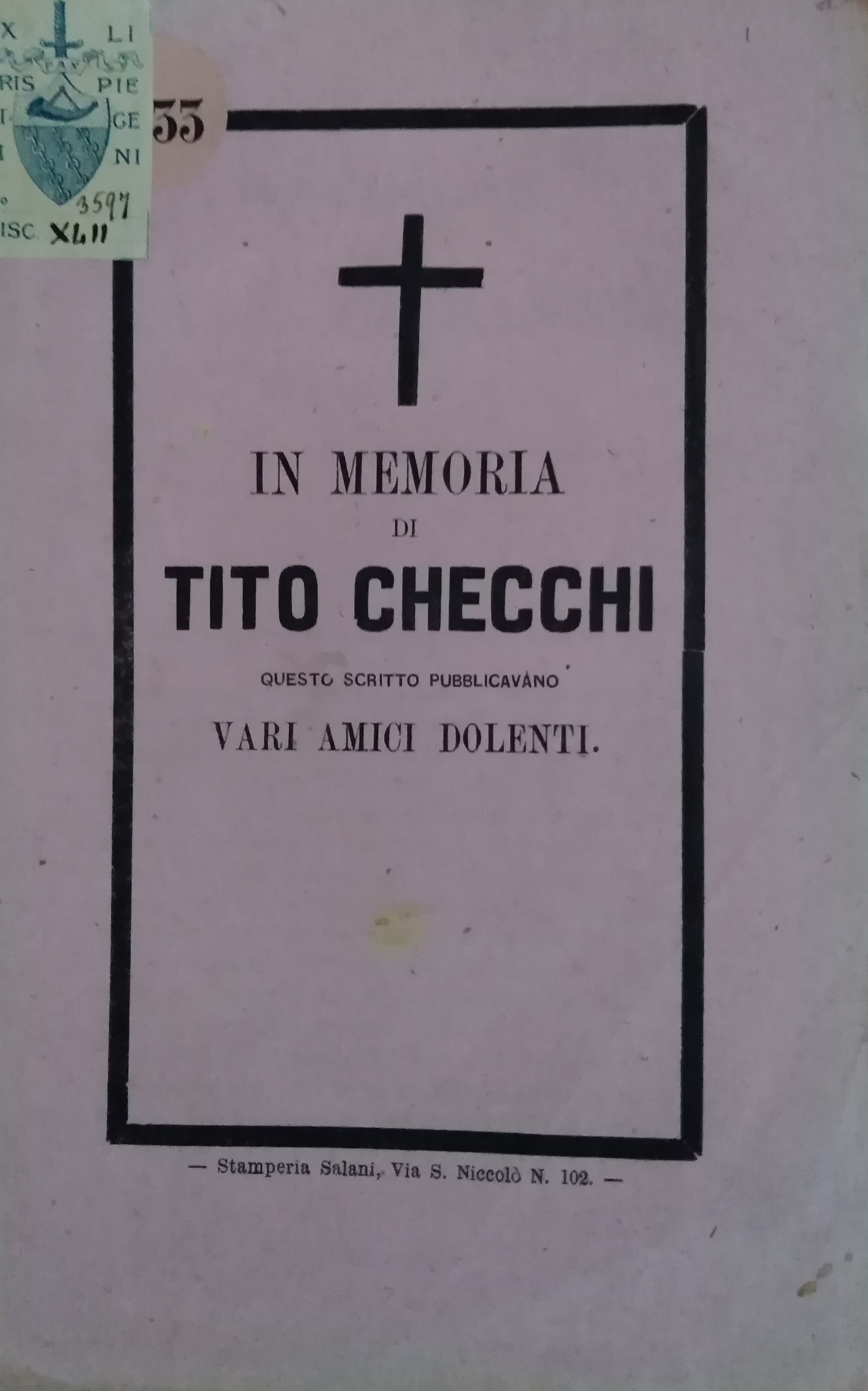 rarissimo necrologio in memoria di Tito Checchi scritto dall'amico e storico Mario Foresi all'interno del quale sono presenti molte preziose informazioni dell'importante garibaldino